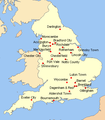 Liste des clubs participants à la league two 2008-2009